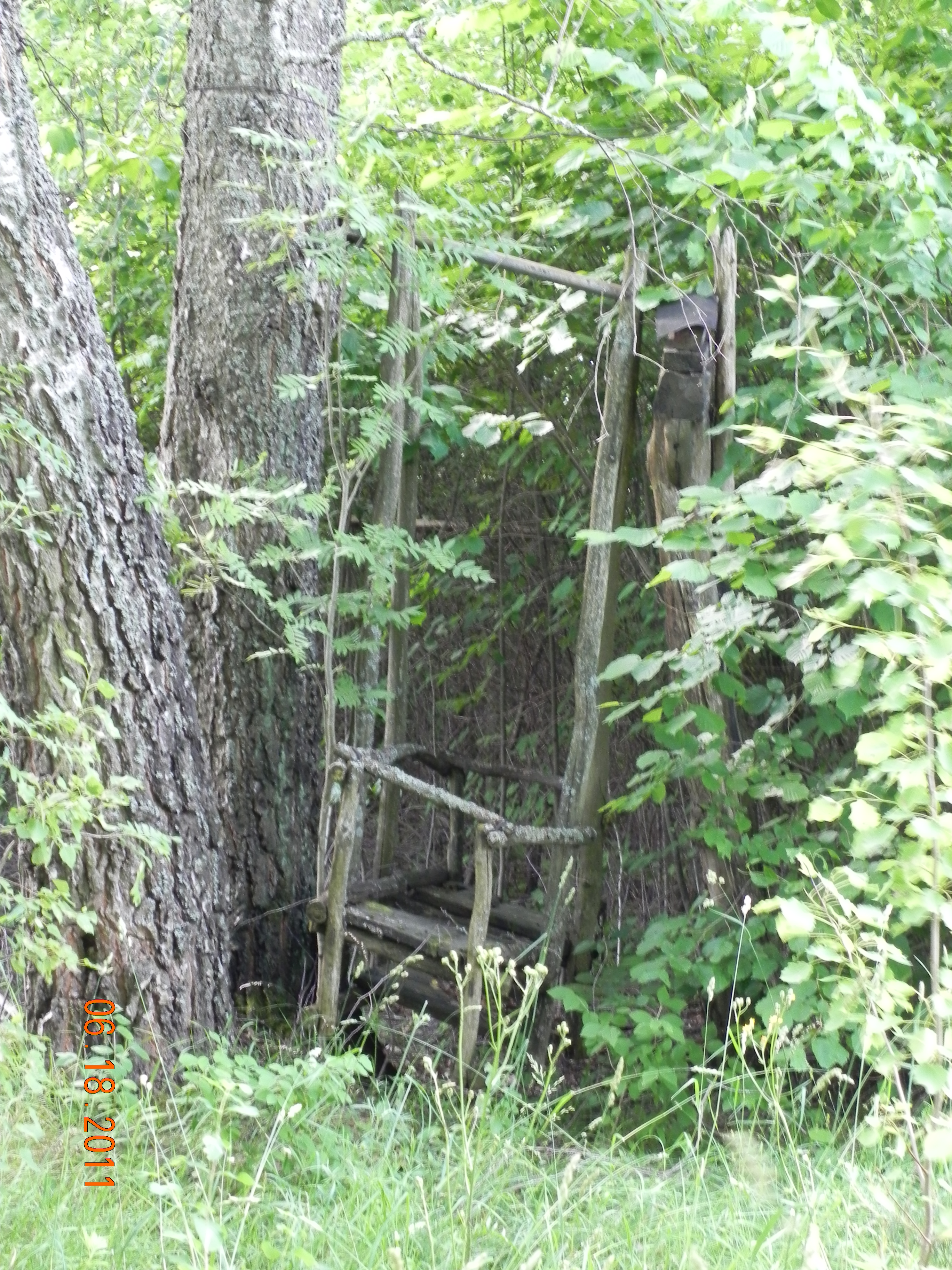 Детские качели.